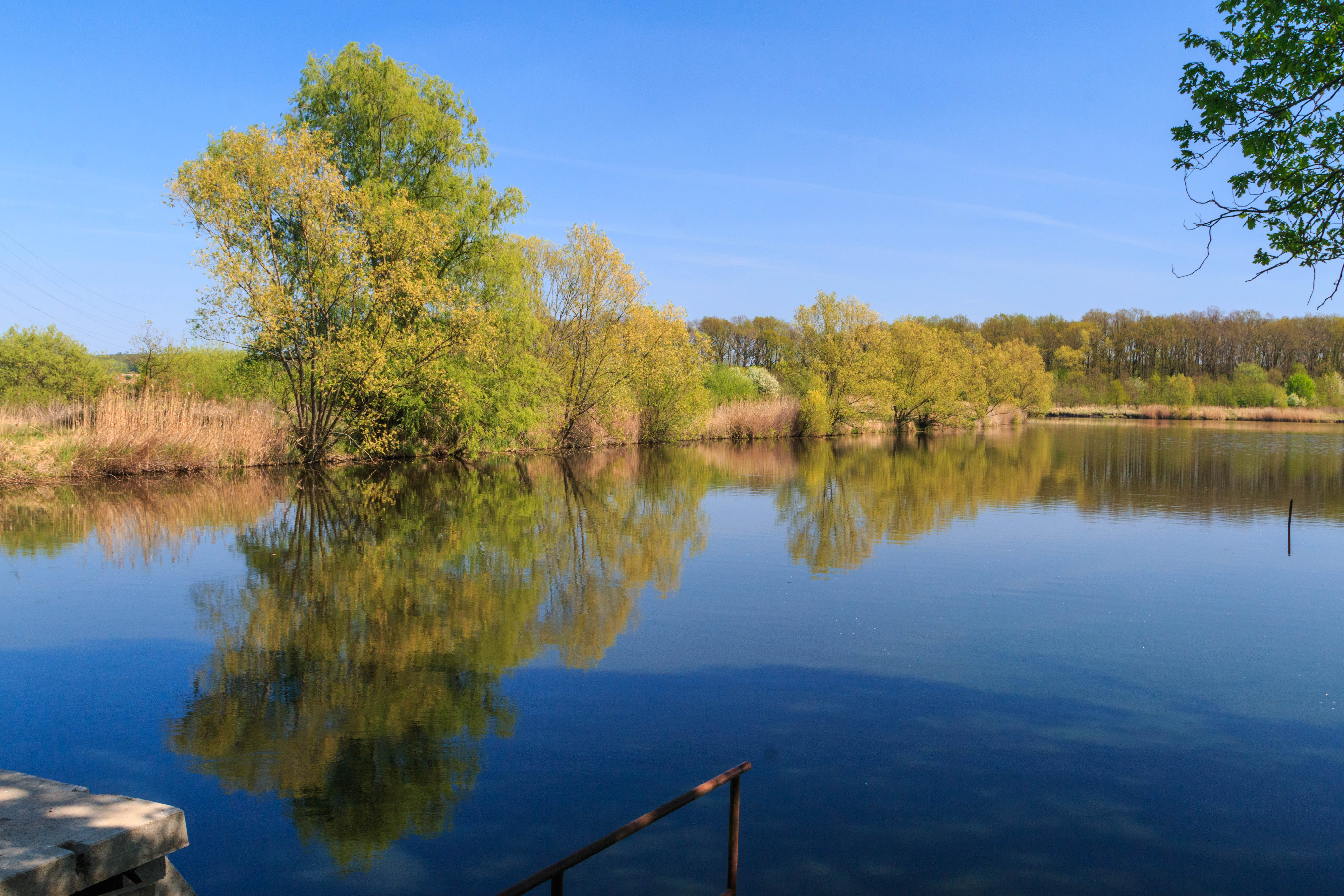 Rybník Homoláč u Lodína Project: Vodstvo.